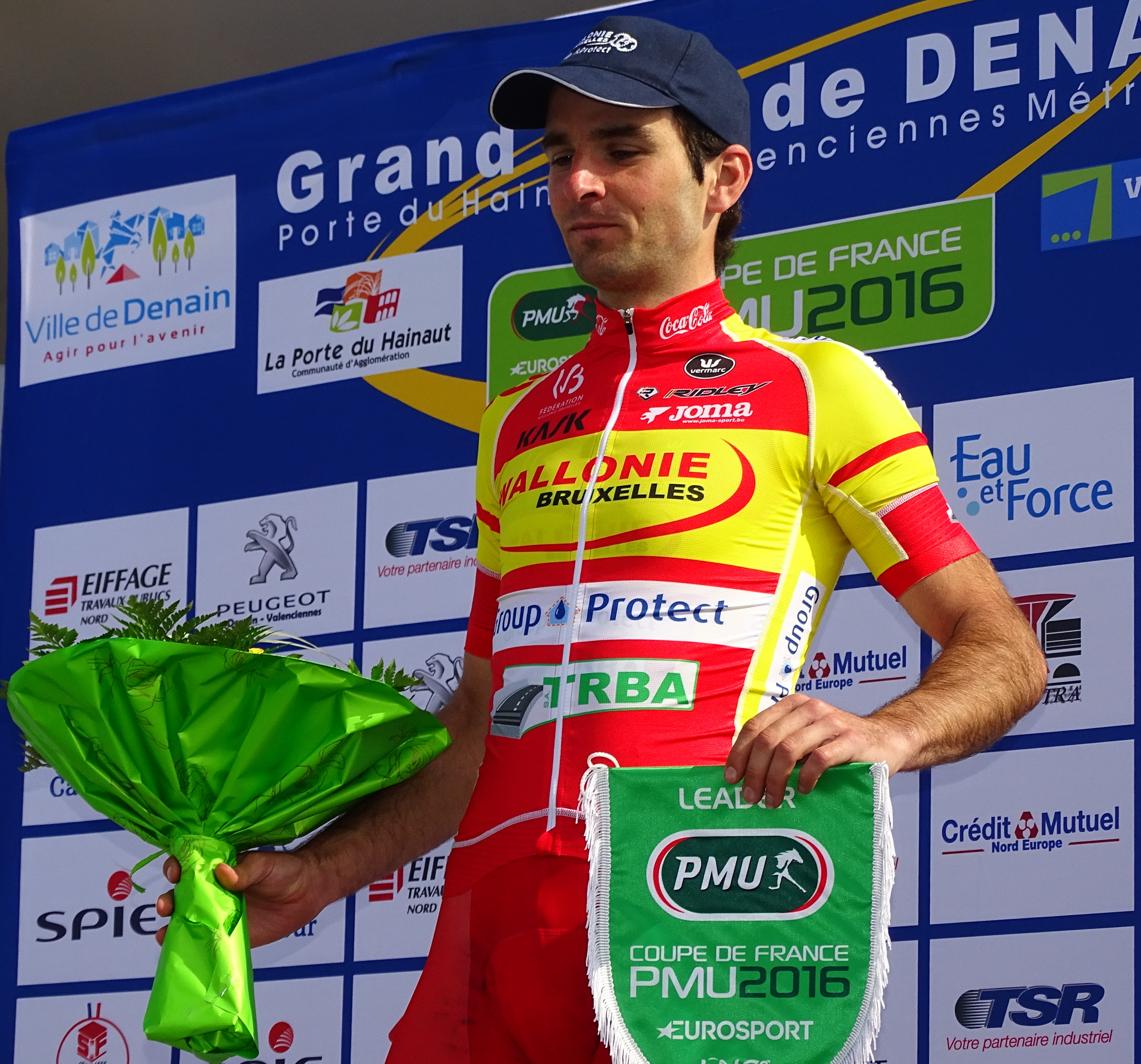 Reportage réalisé le jeudi 14 avril à l'occasion du départ et de l'arrivée du Grand Prix de Denain 2016 à Denain, Nord, Nord-Pas-de-Calais-Picardie, France.